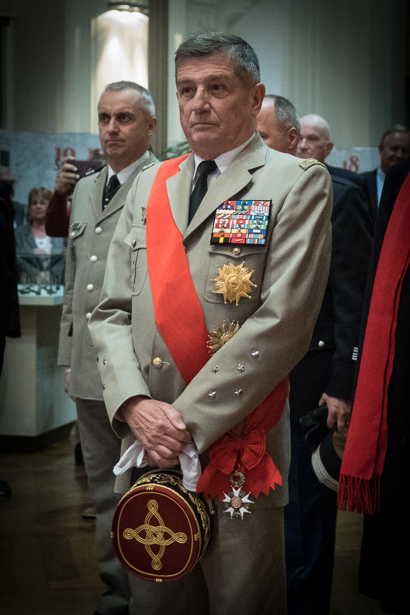 Général Benoît Puga octobre 2019